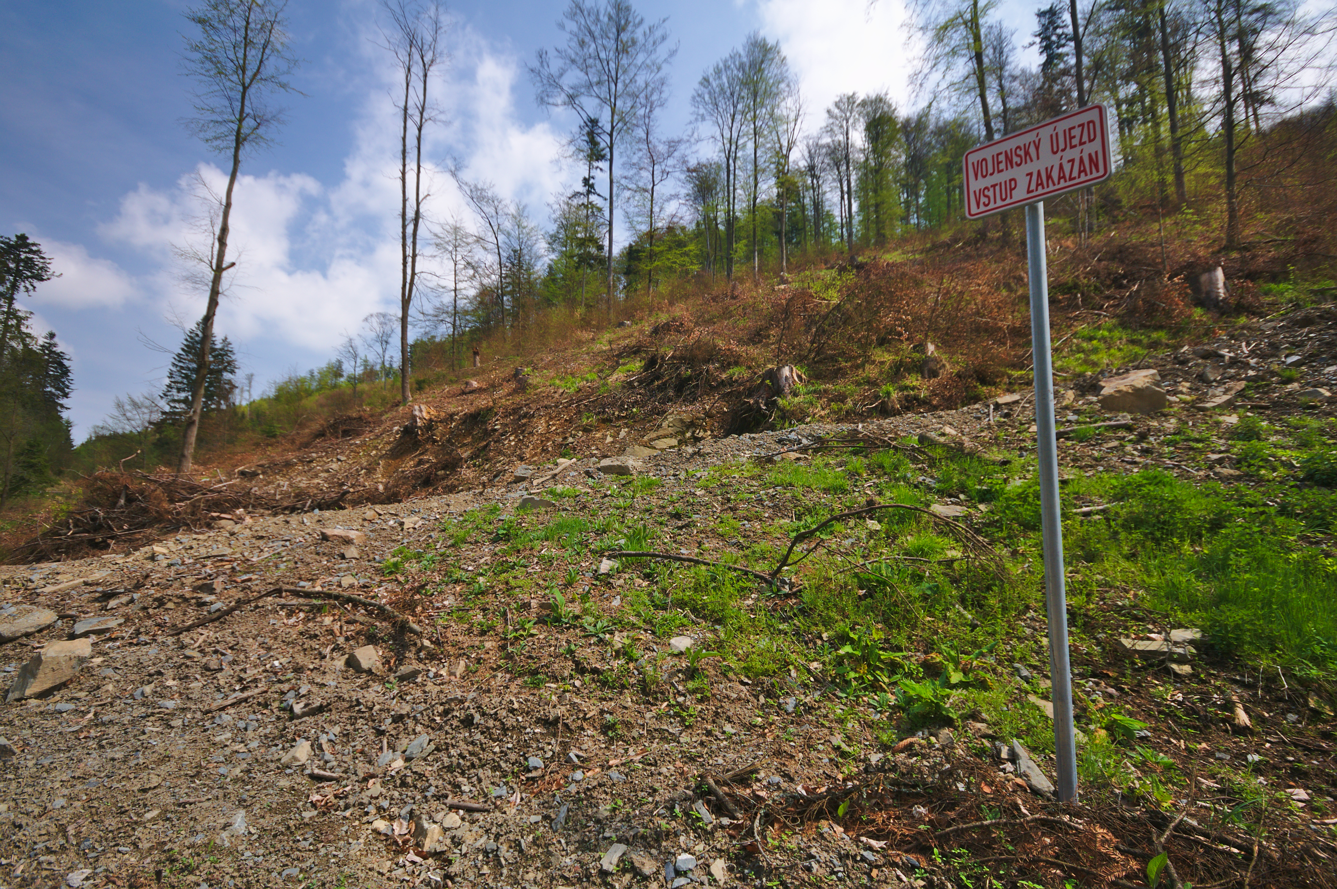 Vojenský újezd Libavá, okres Olomouc